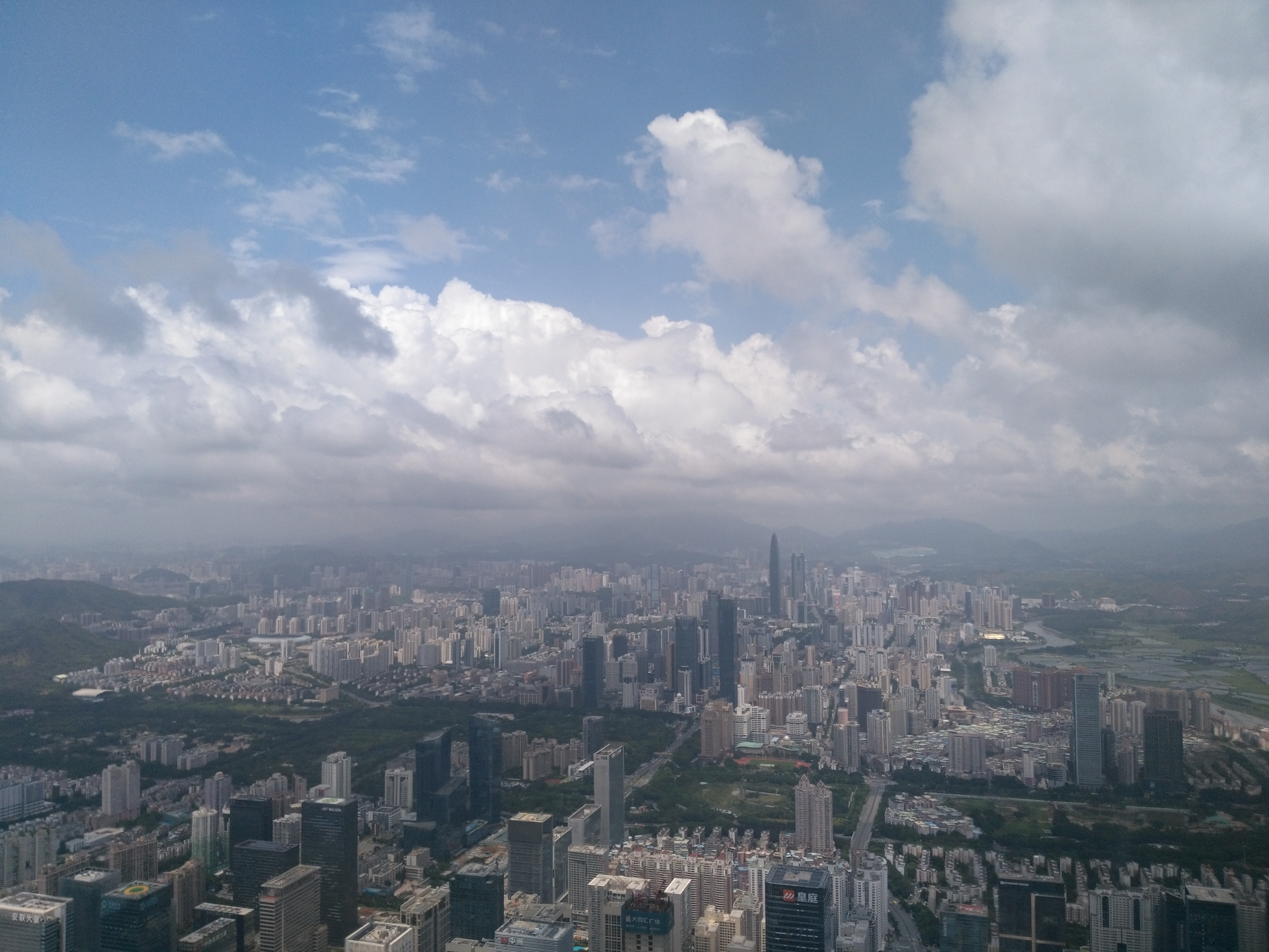 于深圳平安金融中心大厦116层FREESKY观光层（541米）所见的深圳之景，图中可见京基100大厦与地王大厦